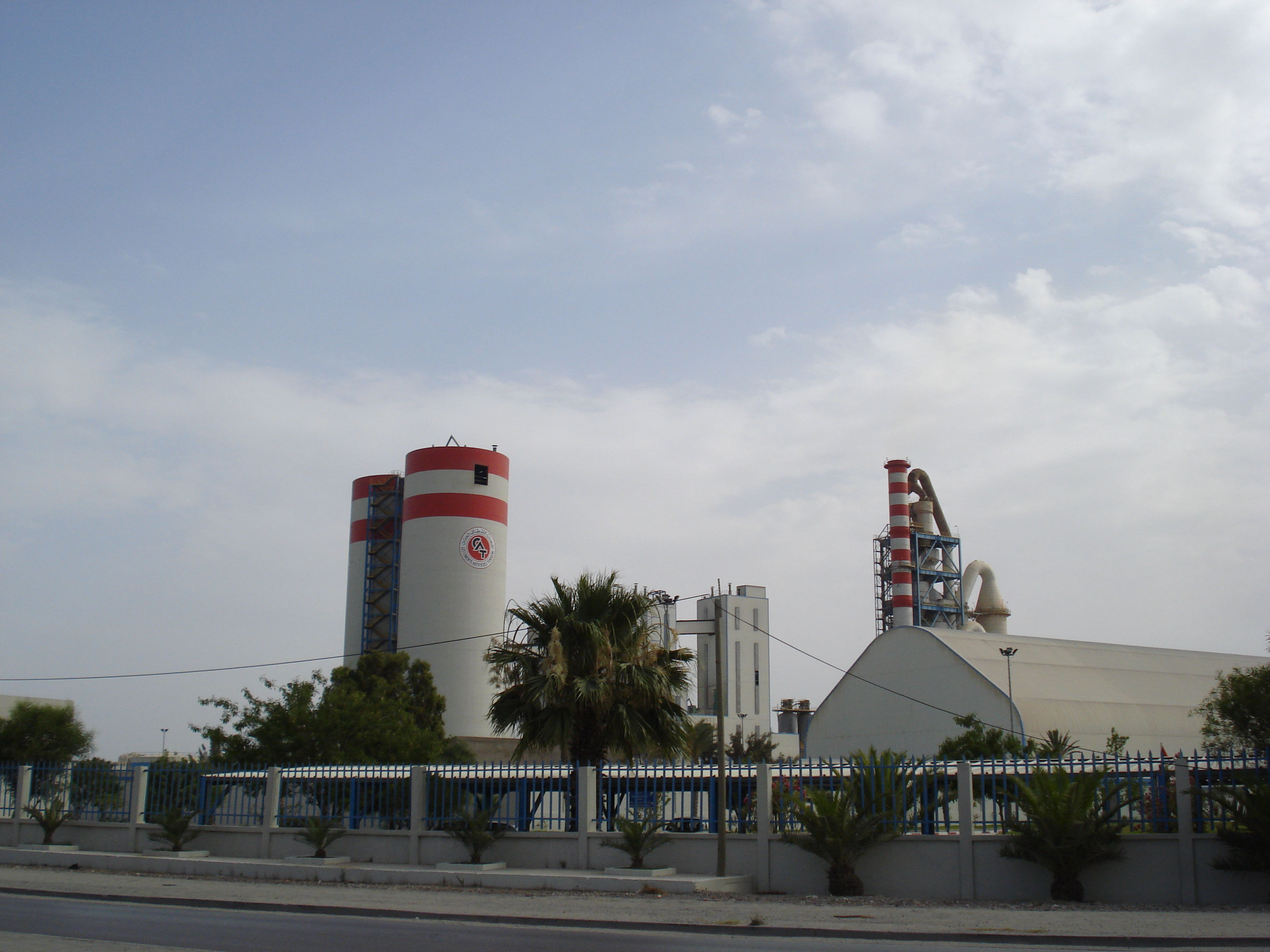 Les Ciments Artificiels Tunisiens, Tunisie.